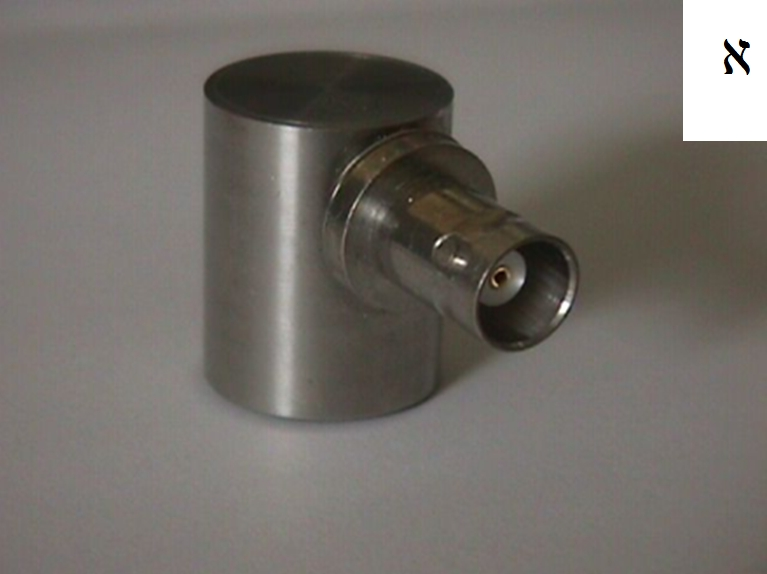 Figure 2A רישיון נוצר על ידי משתמש:Boris.muravin